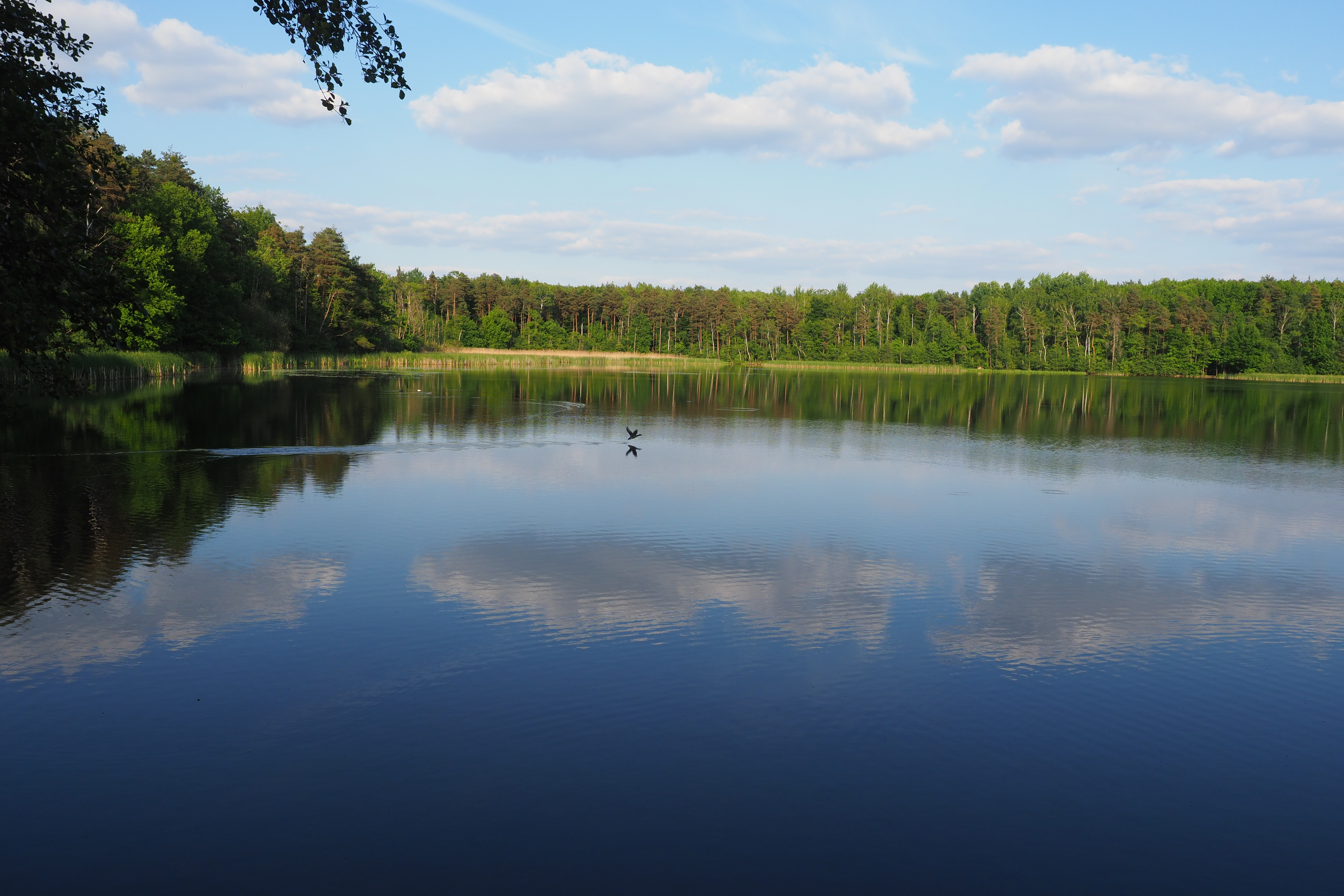 Naturschutzgebiet Neuteich bei Weinböhla